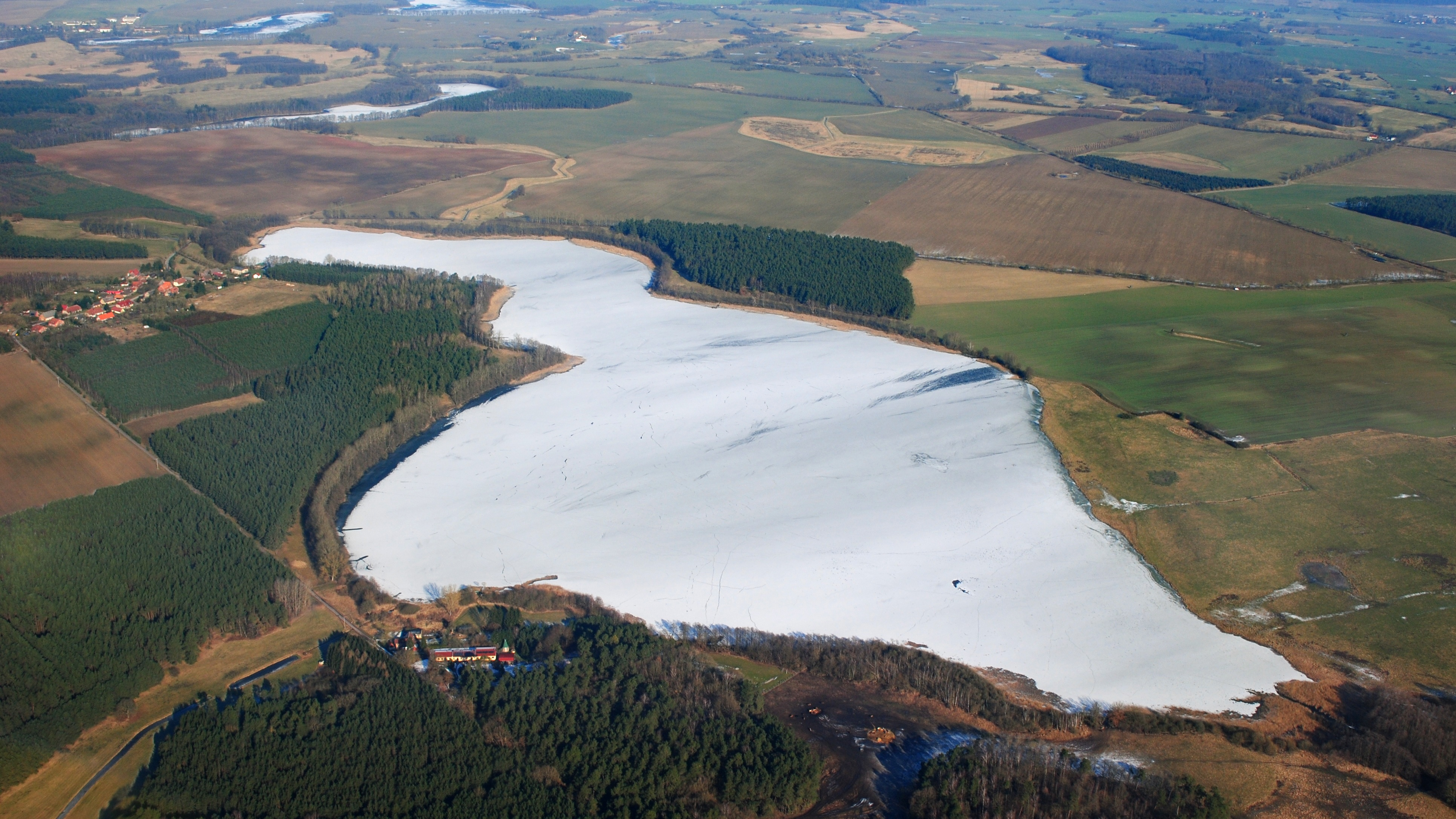 Loppiner See aus Richtung S